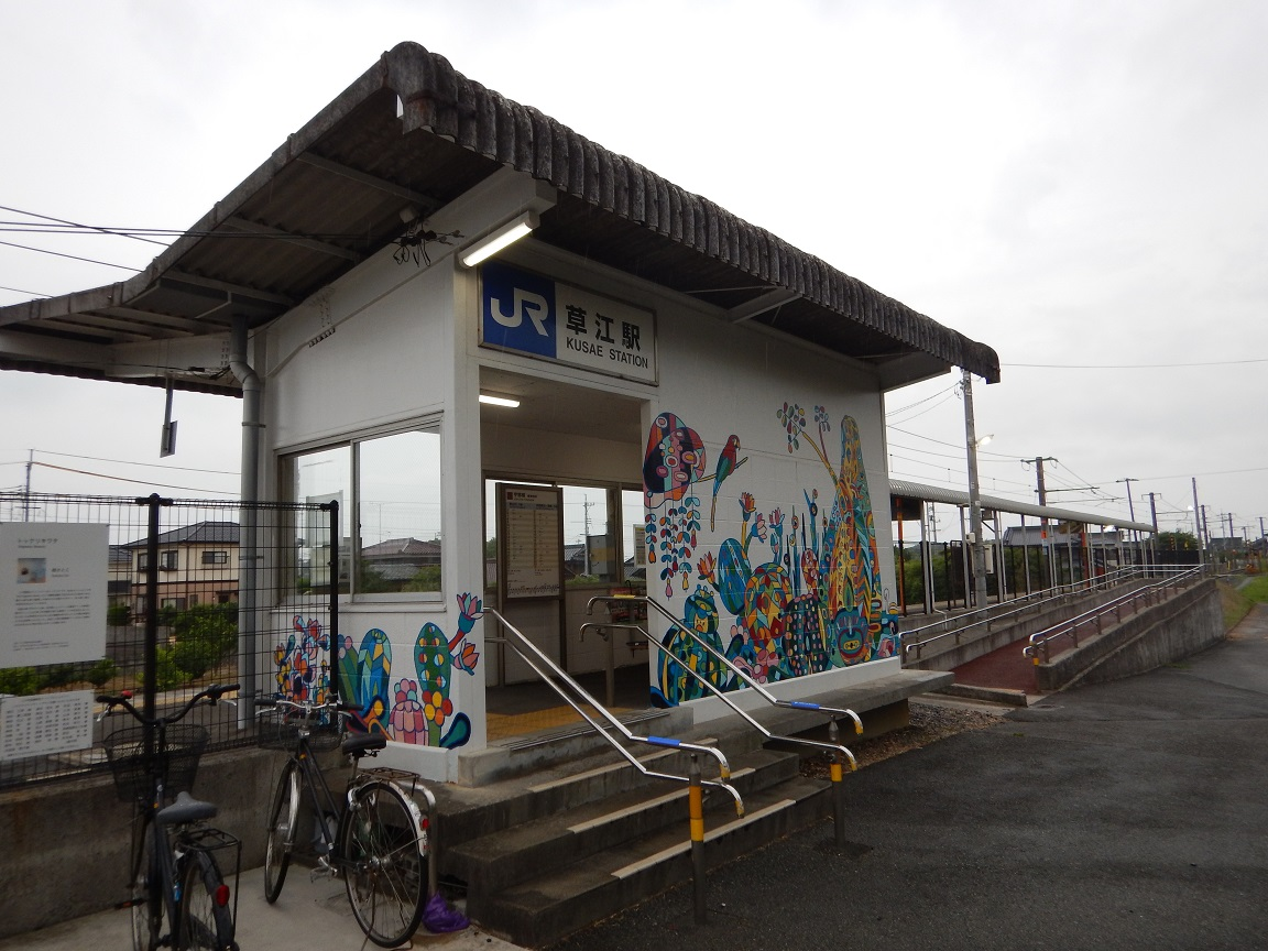 JR草江駅待合室（2019年6月）